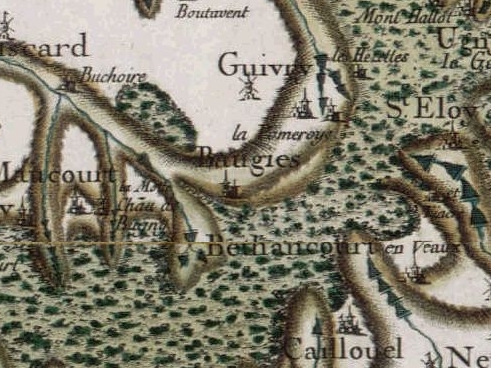 Carte de Cassini de Beaugies-sous-Bois